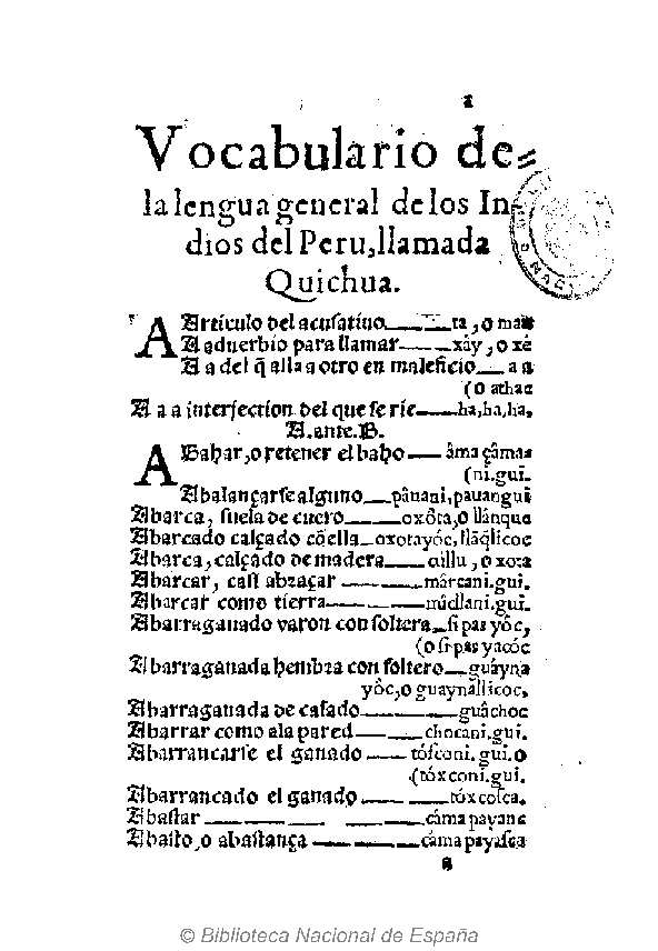 Lexicon, o Vocabulario de la lengua general del Peru cōpuesto por el Maestro F. Domingo de S. Thomas de la orden de S. Domingo ... Autor: Domingo de Santo Tomás (1499-1570) Fecha: 1560 Datos de edición: Impresso en Valladolid por Francisco Fernandez de Cordoua ... (Fernández de Córdoba, Francisco (fl.1541-1570).)